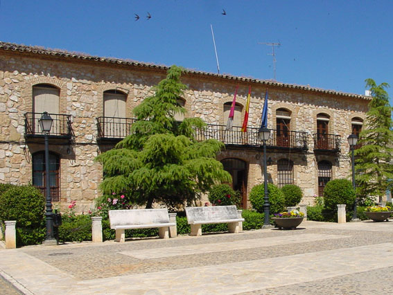 Ayuntamiento de El Toboso (Ciudad Real, España) Fotografía tomada en junio de 2004, con cámara digital. Autor, Lourdes Cardenal.